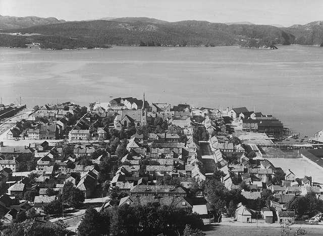 Namsos skyline